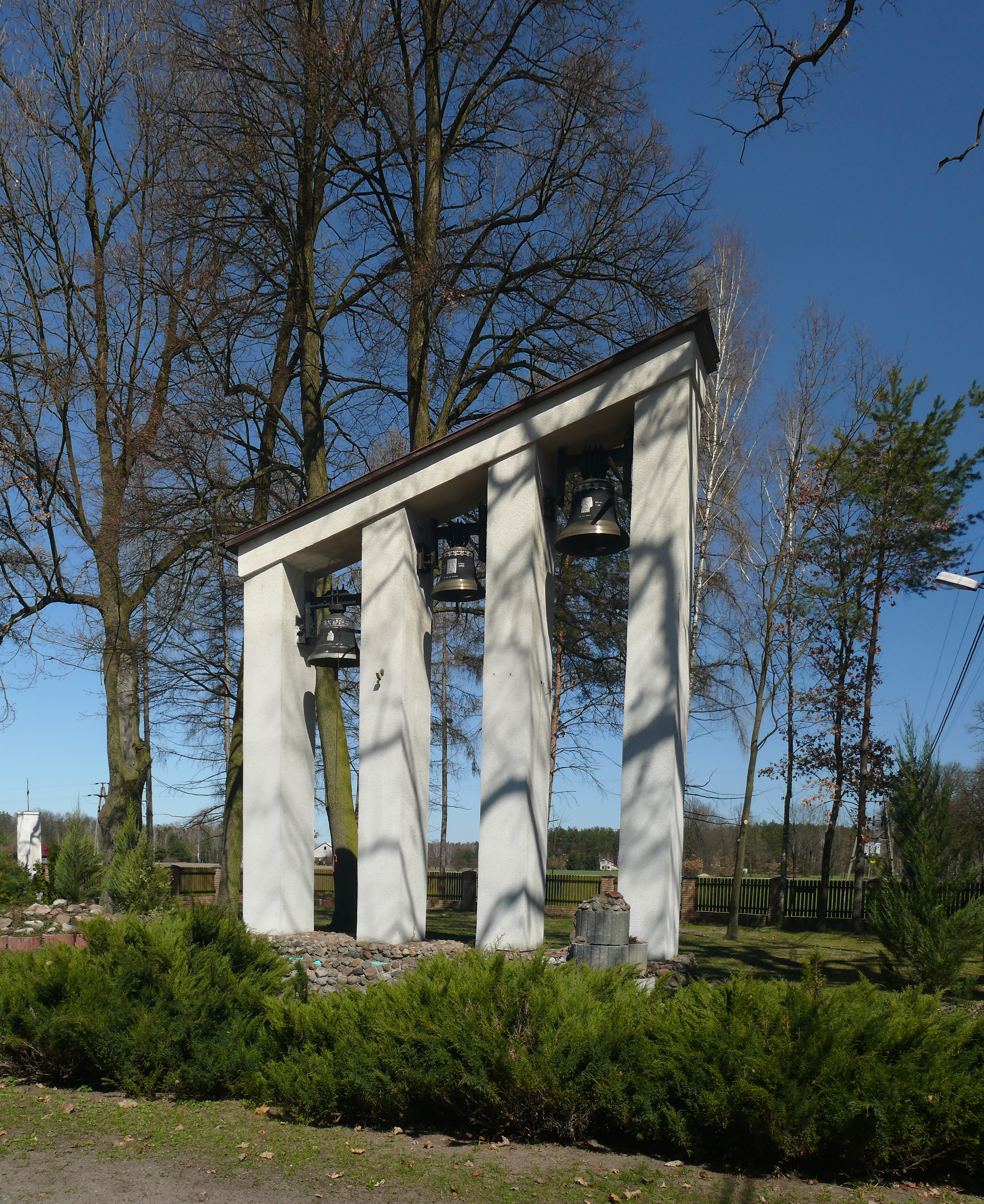 Dzwonnica kościoła parafialnego p.w. Św. Wawrzyńca w Rogóźnie, gmina Ludwin, województwo lubelskie.